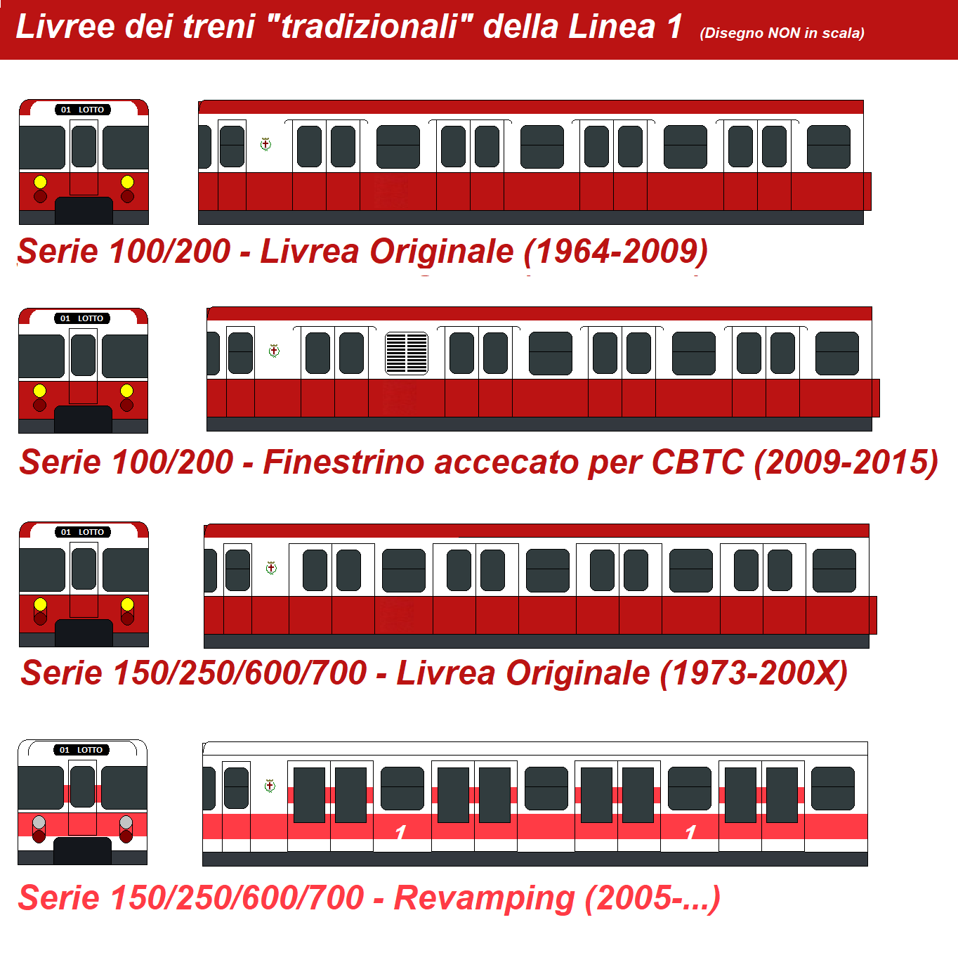 Livree dei treni serie 100/200/150/200/600/700 della Linea 1 della metropolitana di Milano